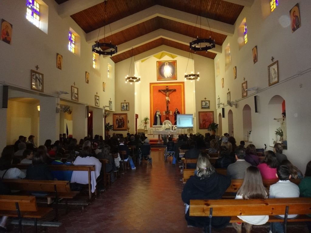 Nueva Jarilla, Jerez de la Frontera (Andalucía, España)